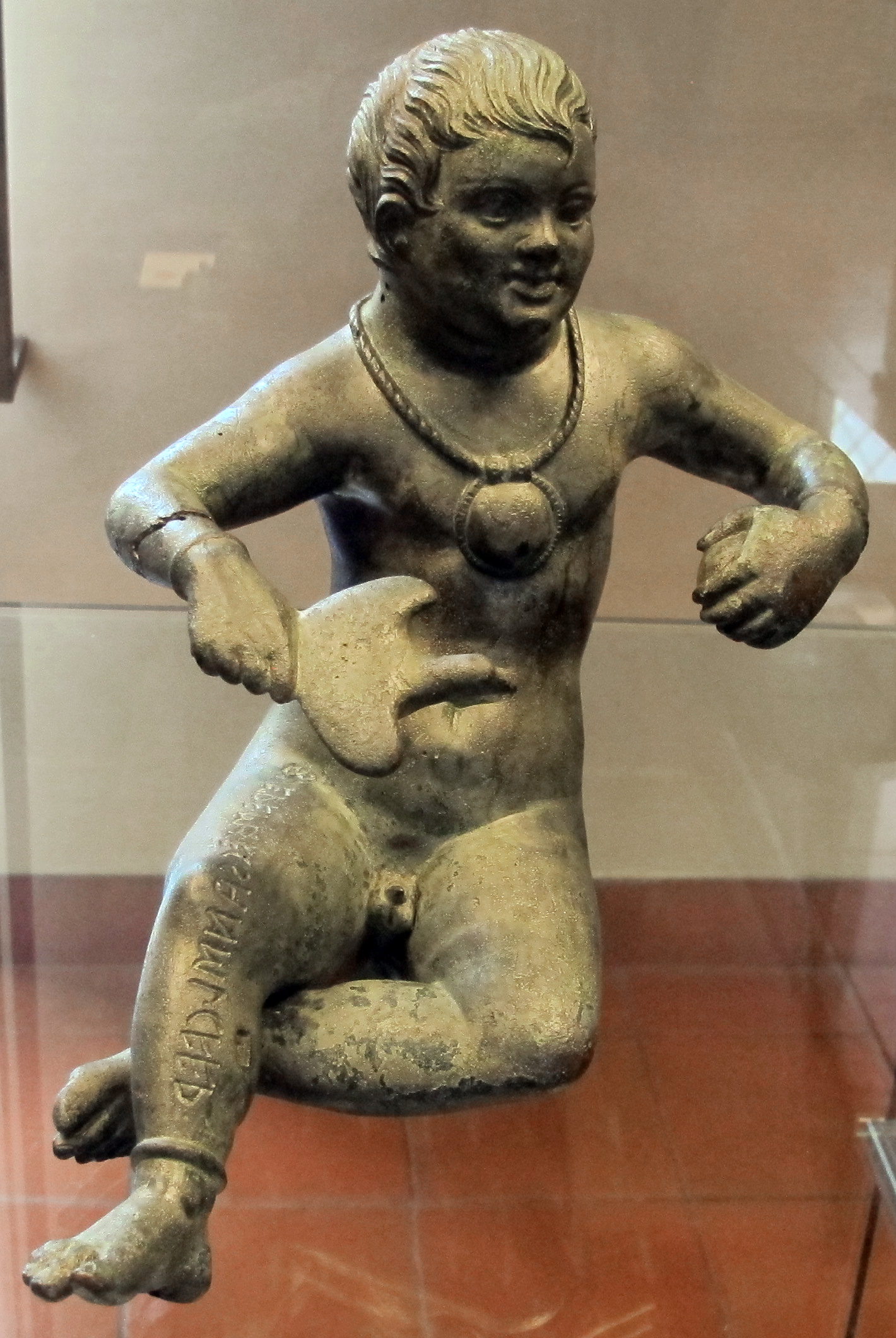 Museo Gregoriano Etrusco